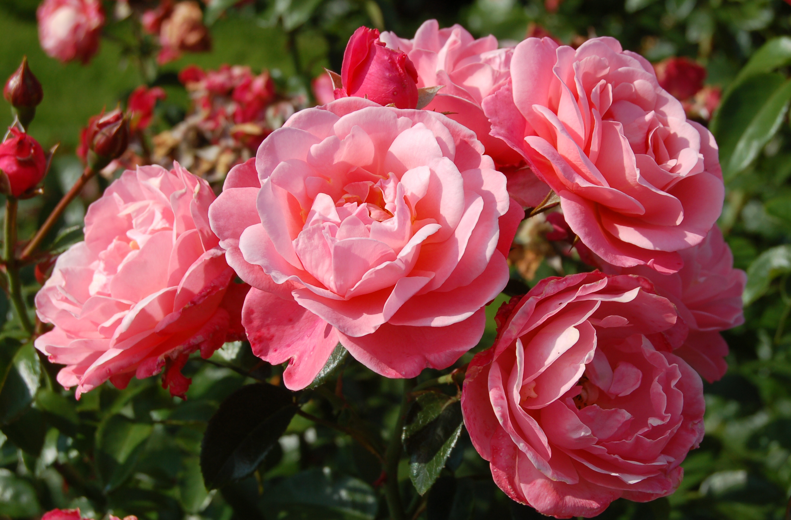 Rosa 'Mein schöner Garten'